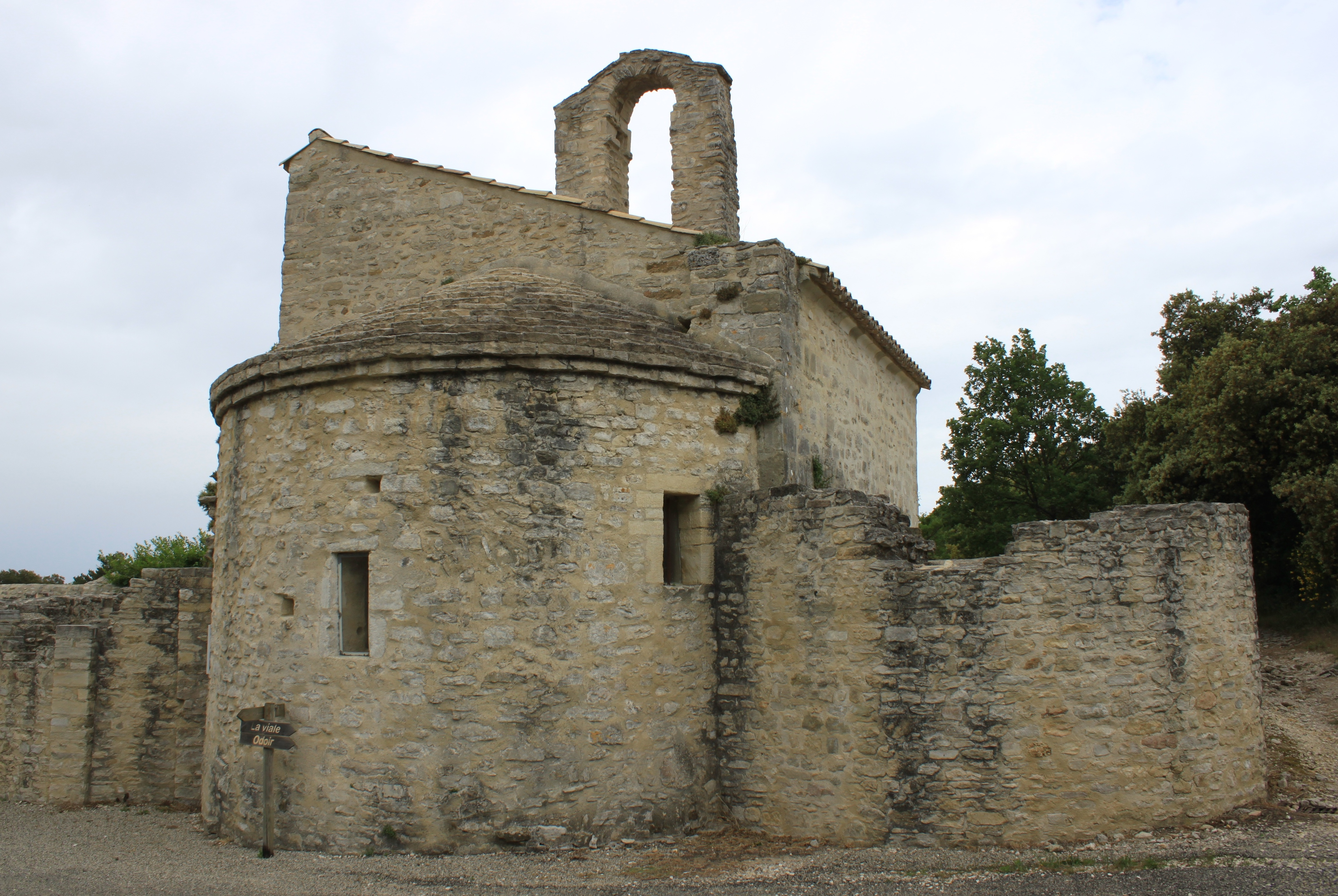 Ruines du prieuré clunisien de Montbrison-sur-Lez (26, France)